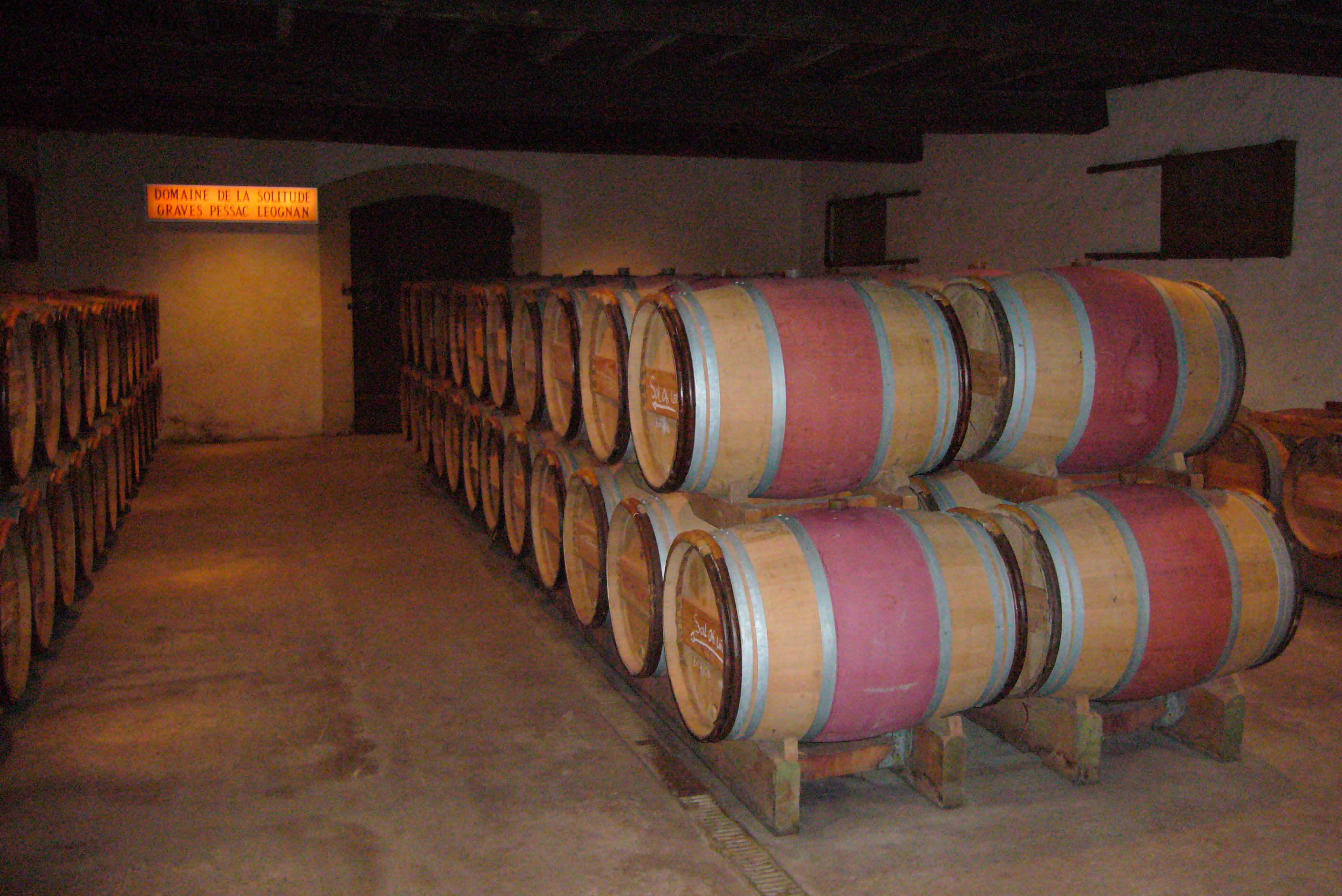 Cave Rouge Domaine de la Solitude (france) AOC Pessac-Leognan